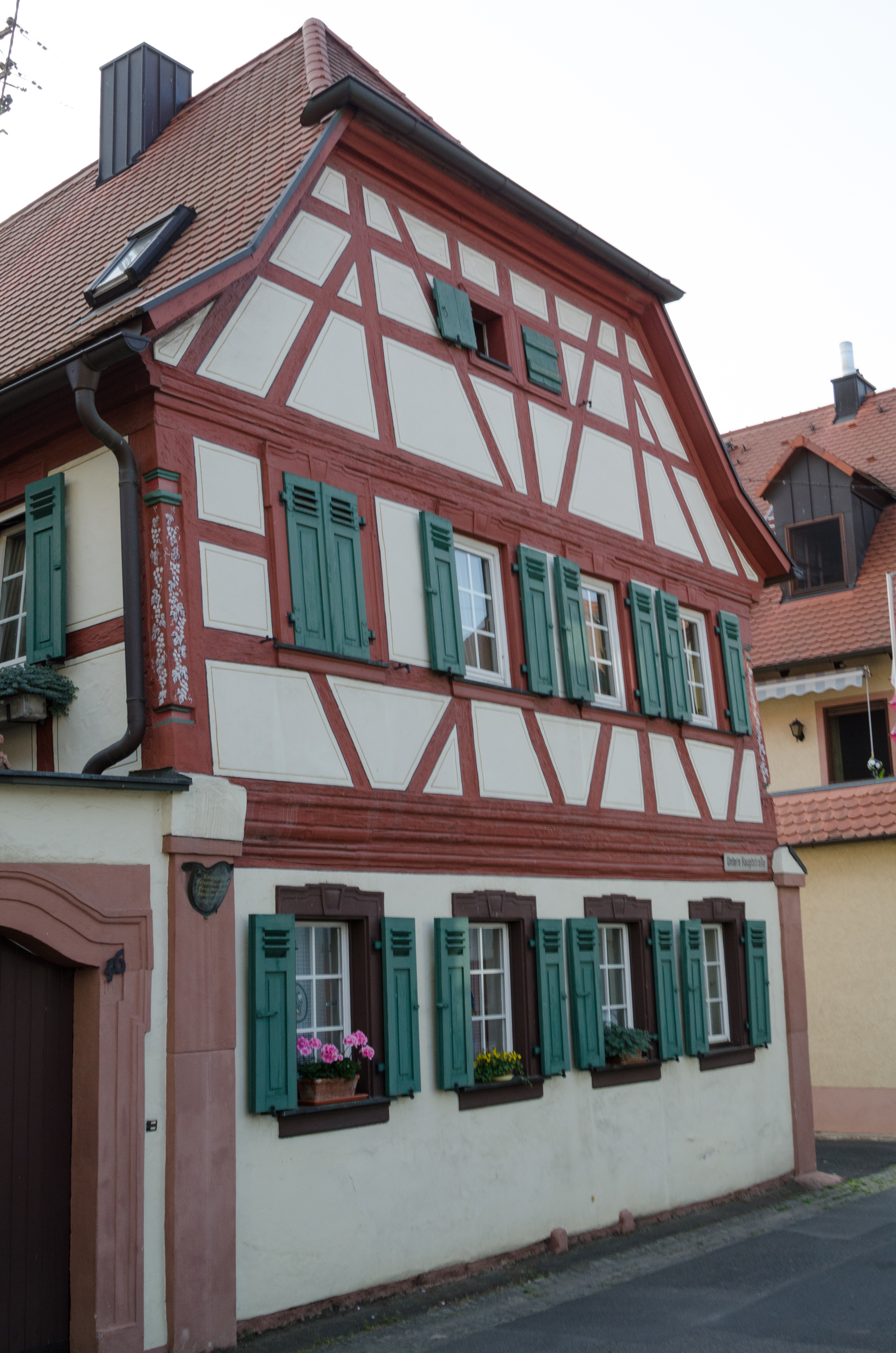 Thüngersheim, Untere Hauptstraße 46